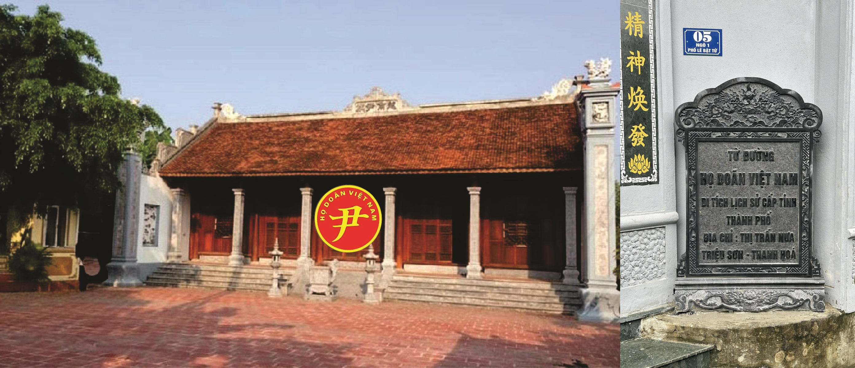 Đền thờ họ Doãn Việt Nam ở Cổ Định, thôn 5, làng Bính, xã Tân Ninh huyện Triệu Sơn tỉnh Thanh Hóa.